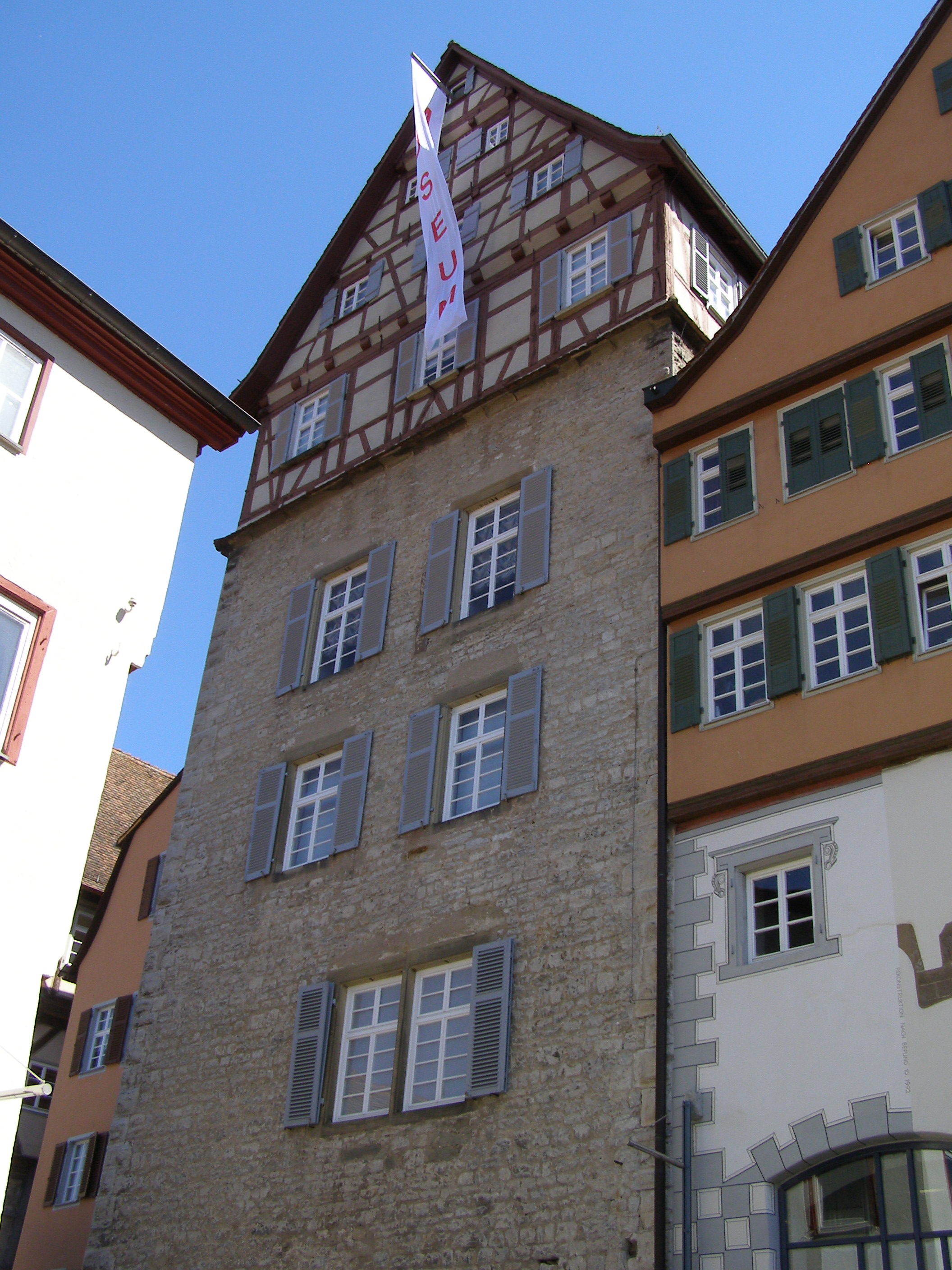 Die Keckenburg ist der älteste Bau des HFM. In dem ehemaligen Wohnturm begann das Museum am heutigen Standort seine Geschichte.